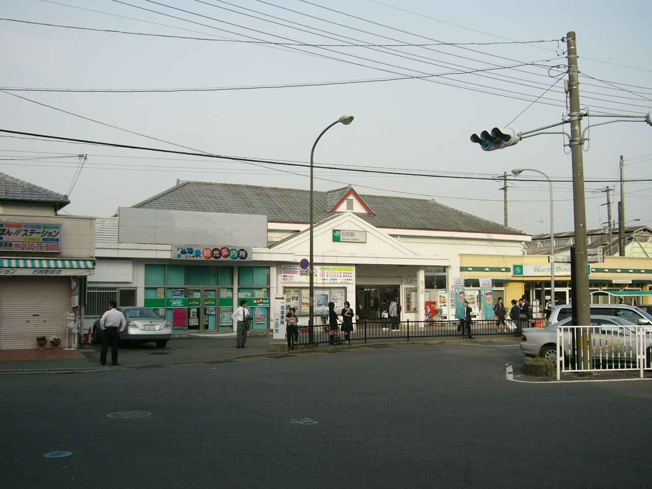 Ishioka Station